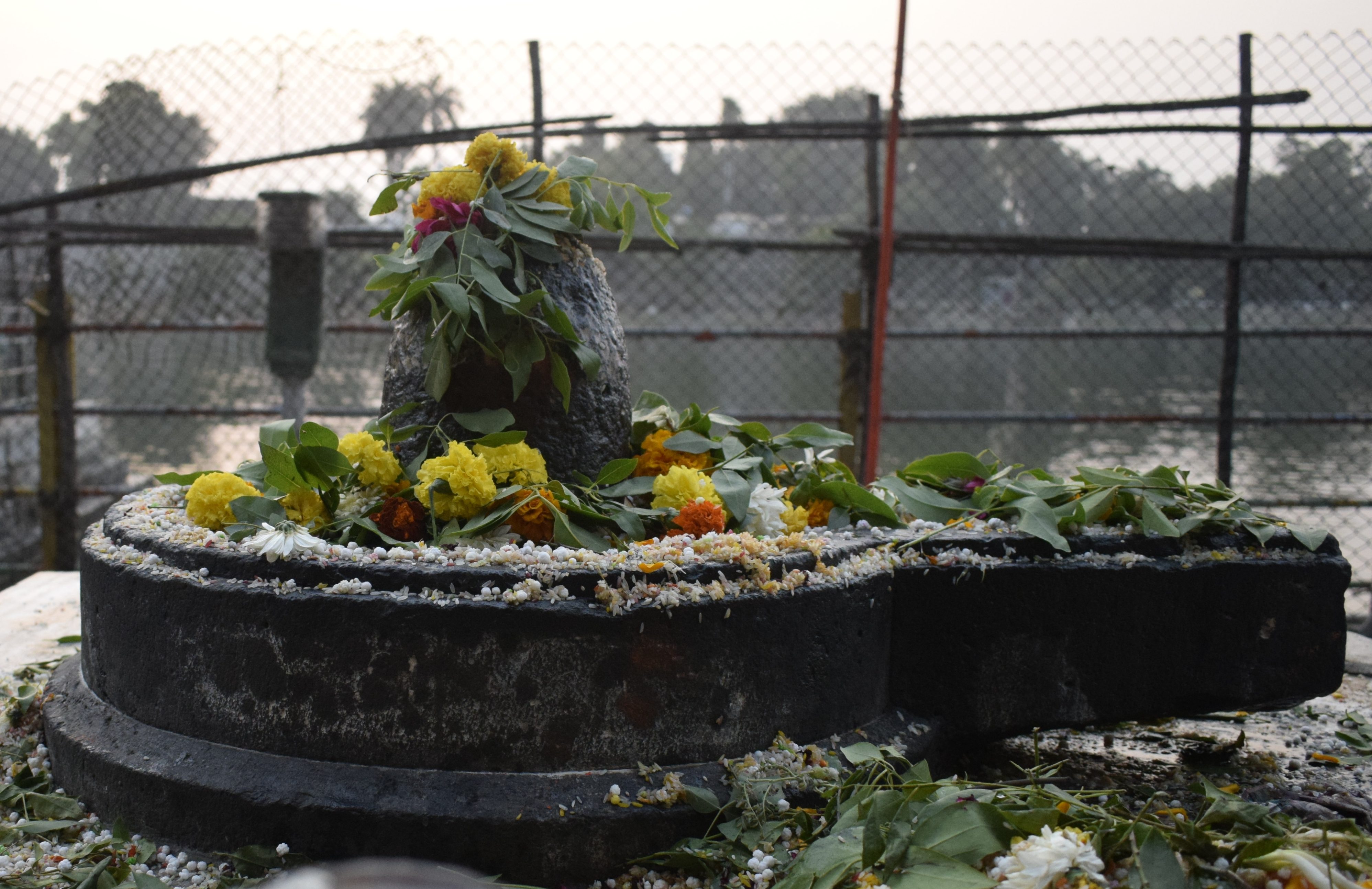 श्री वज्रेश्वर लिंग